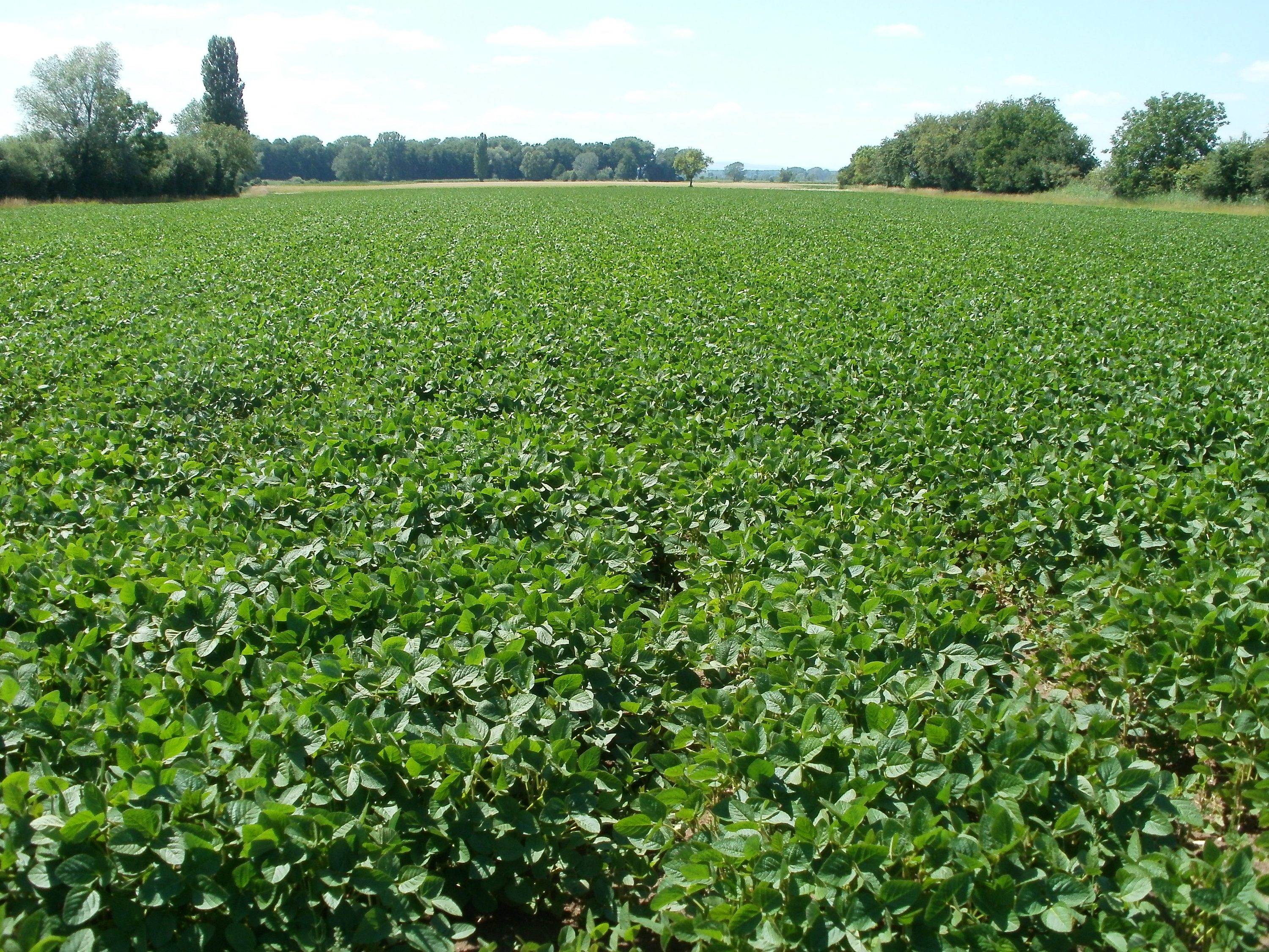 Feld bei Hockenheim